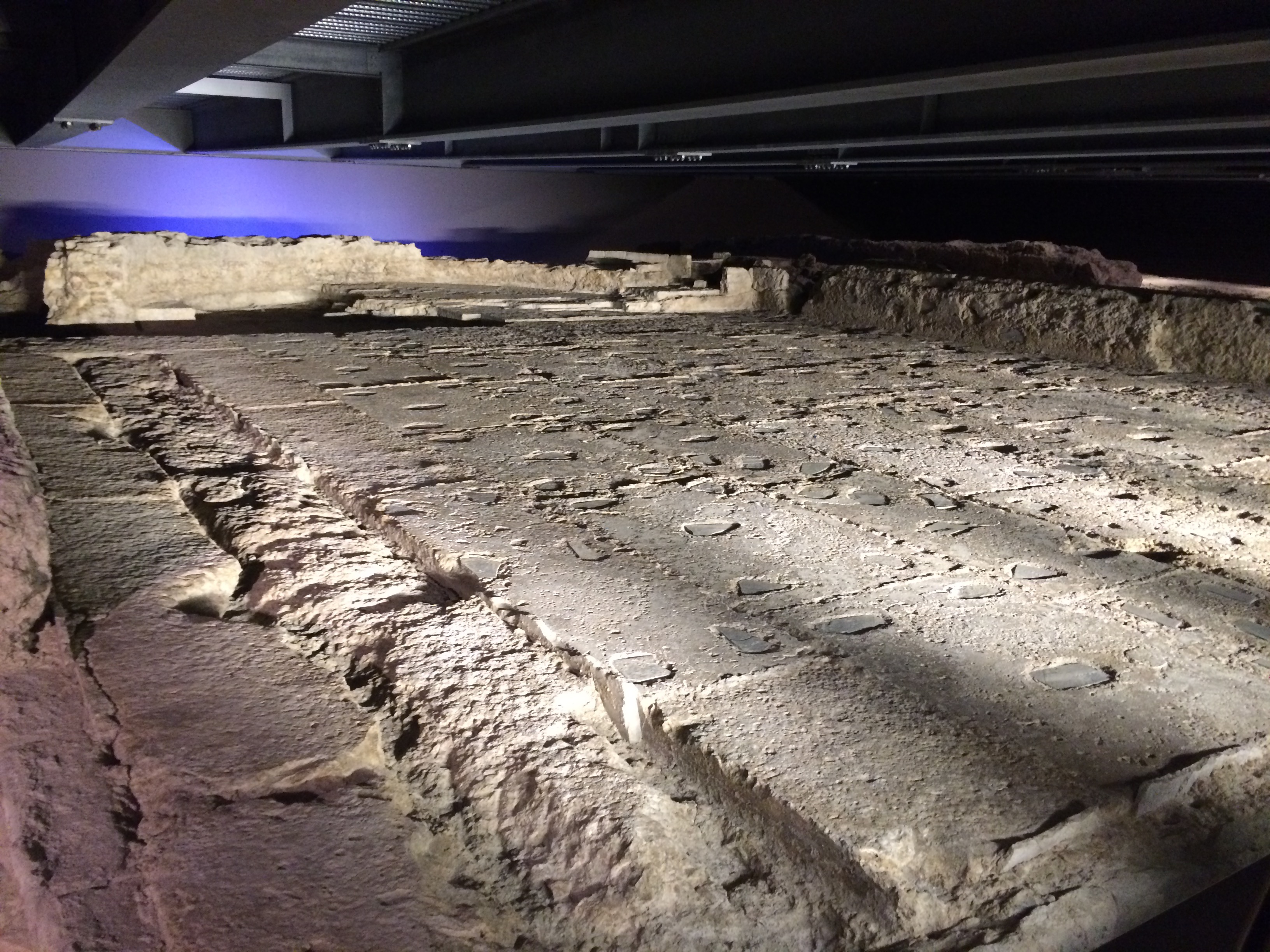 Vano absidato delle terme di via Neroniana